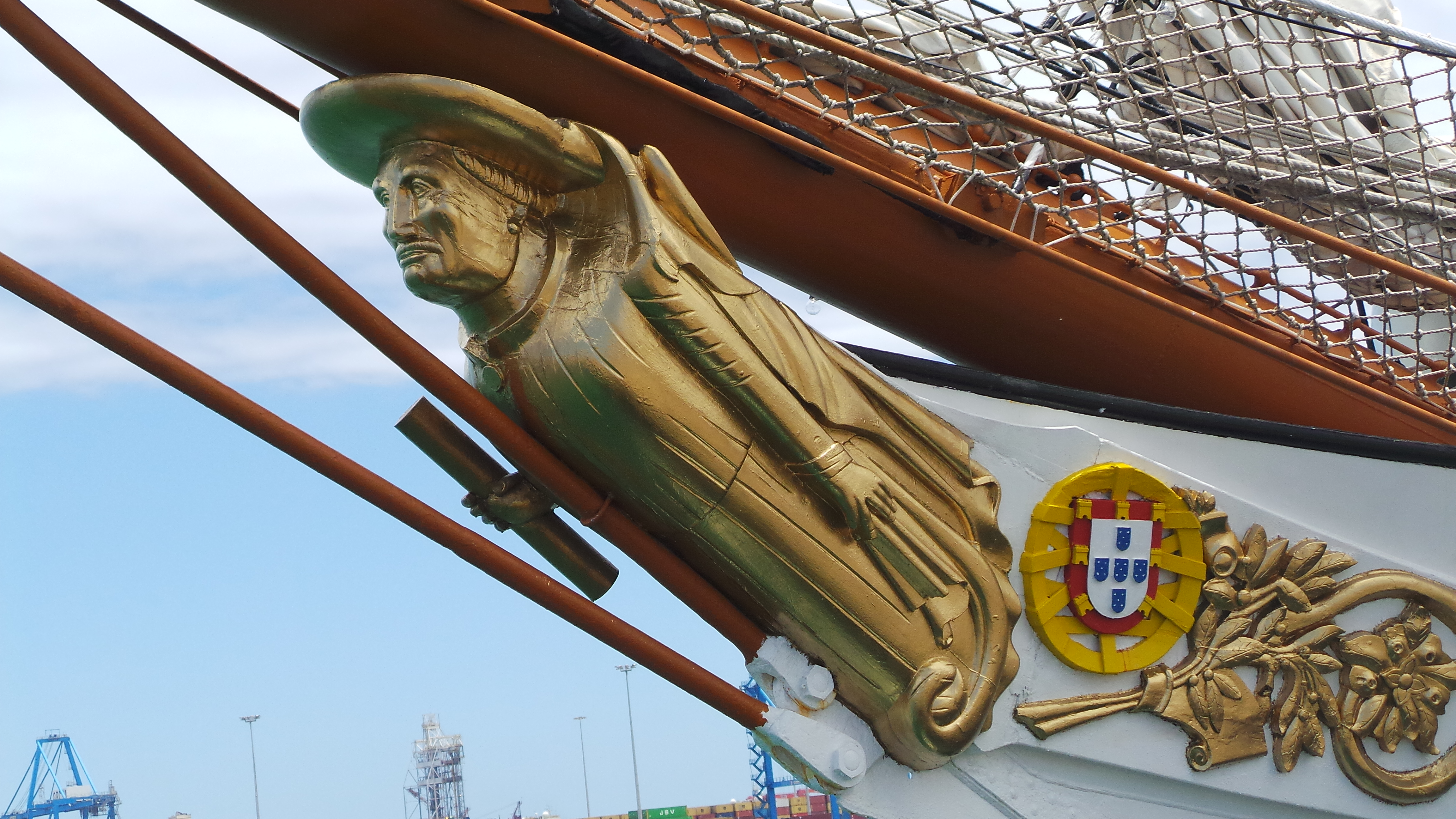 Visita al Buque Escuela NRP Sagres, en La Base Naval de Las Palmas de Gran Canaria. Este fin de semana de semana ( 20, 21 y 22 de junio de 2014) tenemos la oportunidad de disfrutar, en Las Palmas de Gran Canaria, de la visita del buque escuela portugués NRP Sagres, se encuentra atracado en el muelle de la base naval y podrá ser visitado hoy viernes hasta las 19h y mañana sábado de 10 a 12h y de 14 a 19h . El Buque proveniente de Lisboa partirá el domingo hasta Las Azores , para luego regresar a Lisboa, cuenta con unos 60 guardiamarines, con una decena de mujeres entre ellos, que realizan su periodo de instruccion Construido en 1937 en Hamburgo y tras varios avatares, fue adquirido en 1961 por la marina Portuguesa para sustituir al Sagres II, entrando en servicio como Sagres III en febrero de 1962. Tiene 89,5 metros de eslora, 12 de manga y 5,5 de calado, siendo su altura máxima de 45,5 metros. Cuenta además con 1.971 metros cuadrados de vela y desplaza 1.893 toneladas. La figura del mascarón de proa del Sagres III es el Infante D. Henrique nacido el 4 de marzo de 1394, siendo uno de los impulsores de la expansión y descubrimientos portugueses de la época. Más información del Buque : Web del Buque